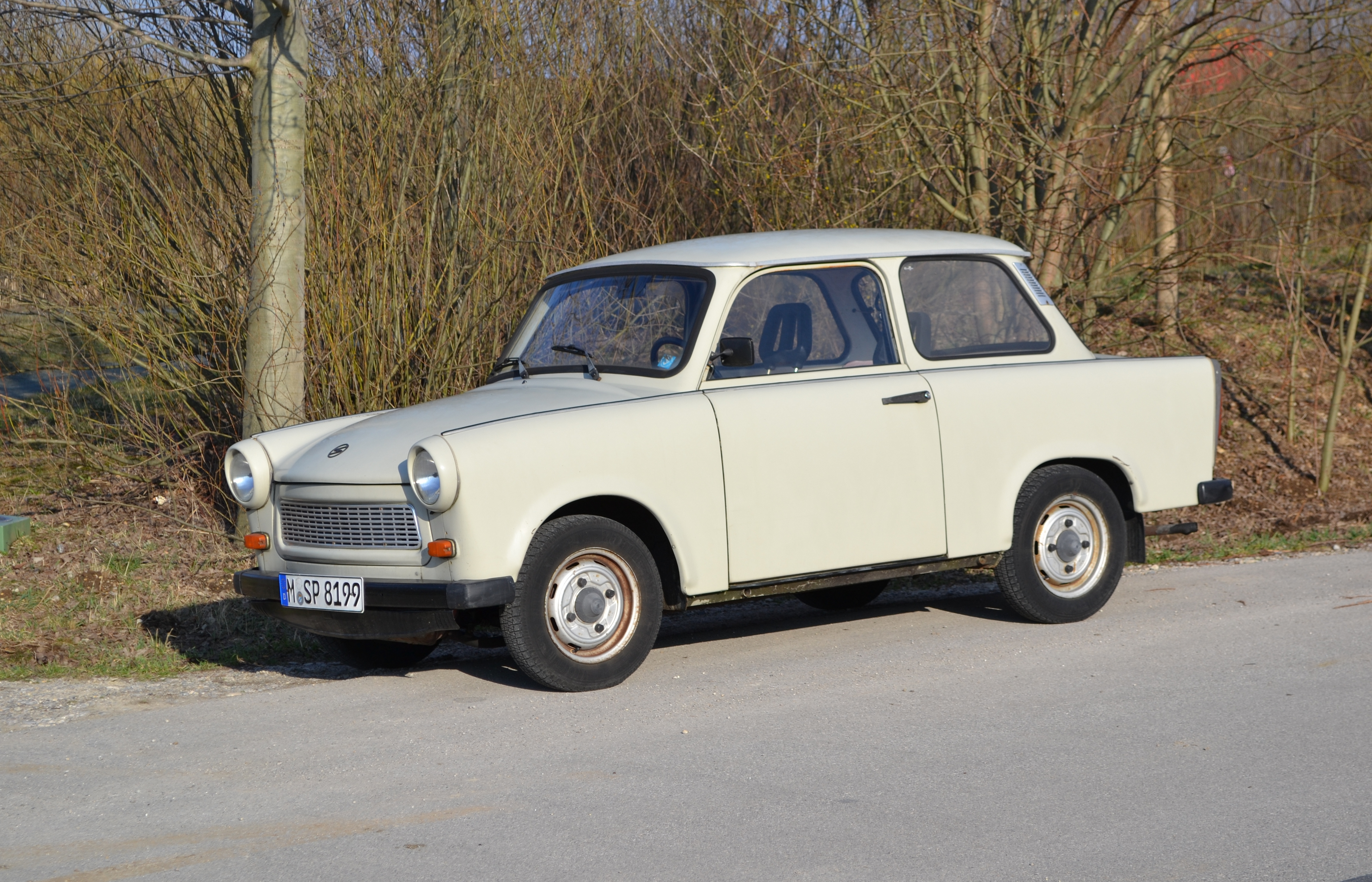 Trabant 601.